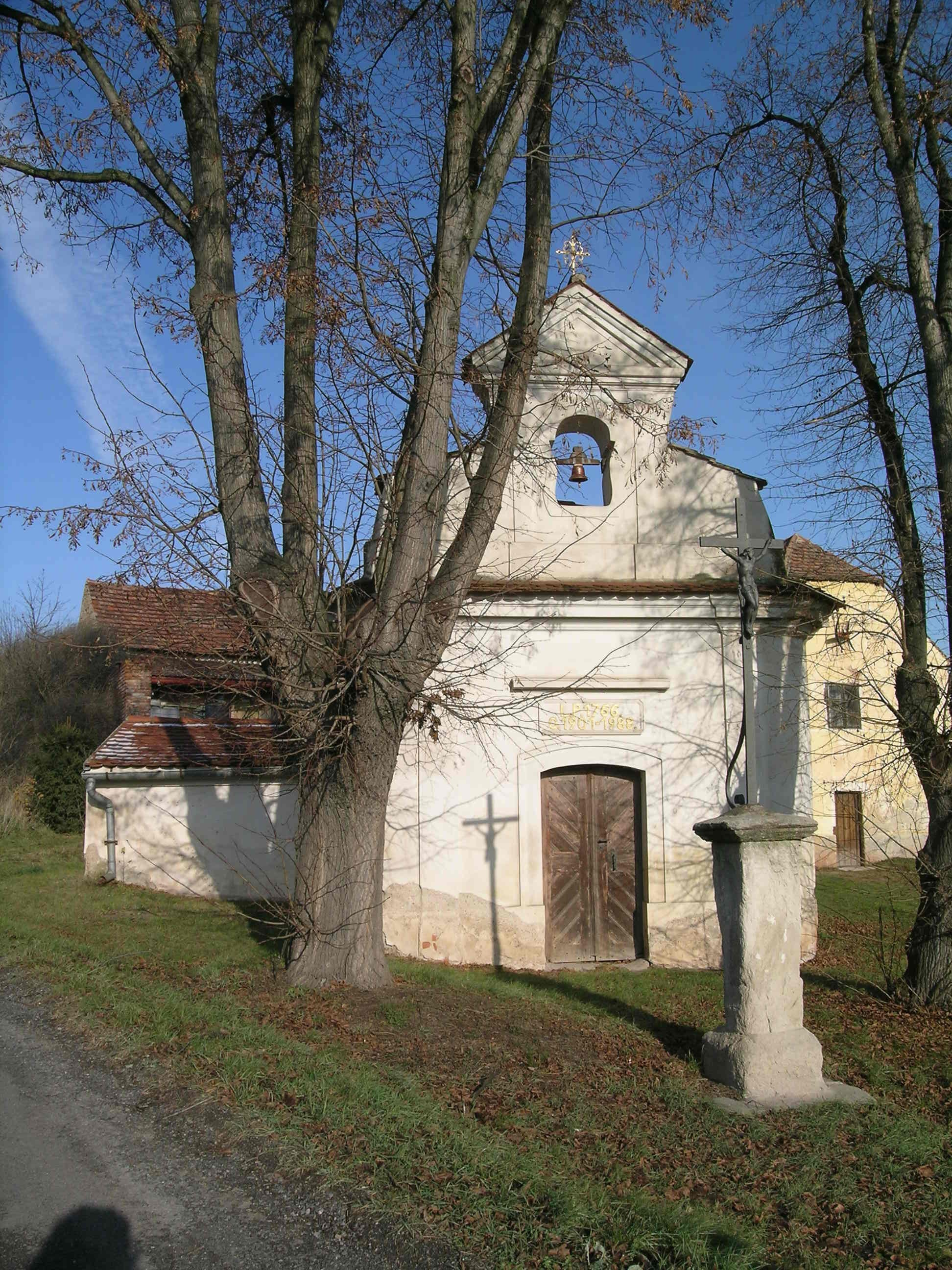 Kaple sv. Vojtěcha (Drchkov), Drchkov